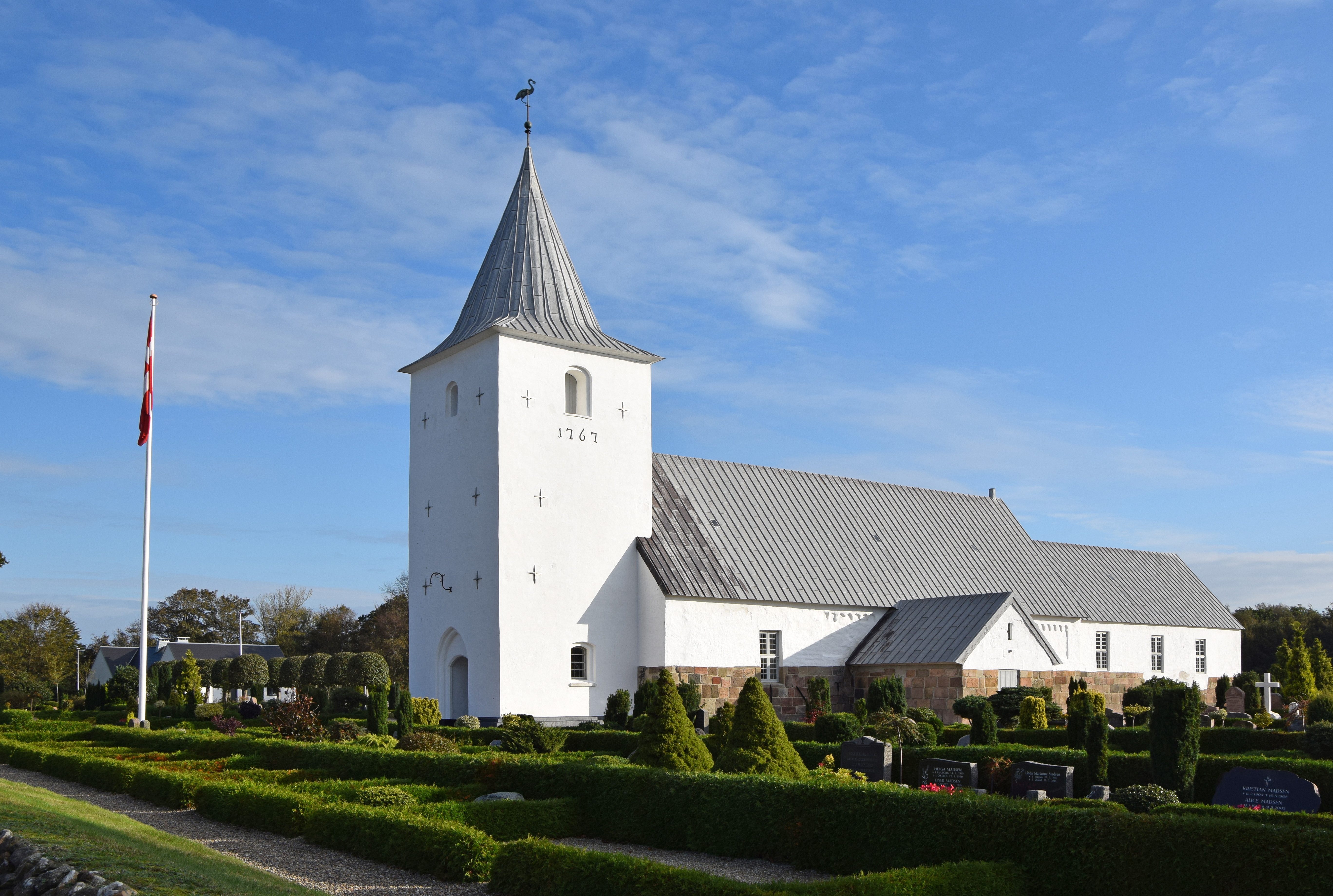 Aal Kirche aus Südwesten